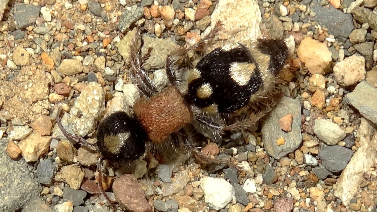 photographié à Vale de Gama (Mação-Portugal)